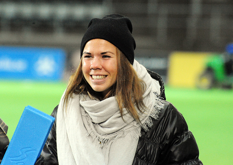 Jessica Samuelsson